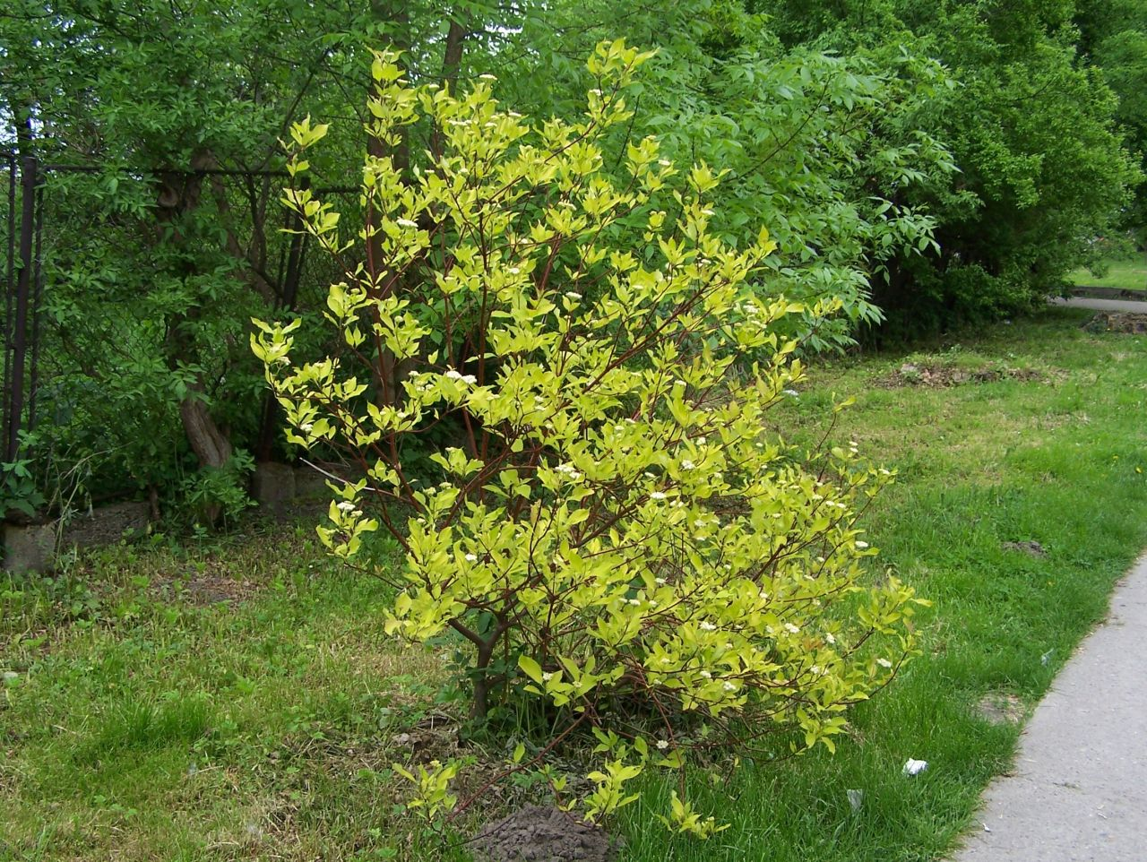 Cornus alba (pl. dereń biały, odmiana ozdobna)